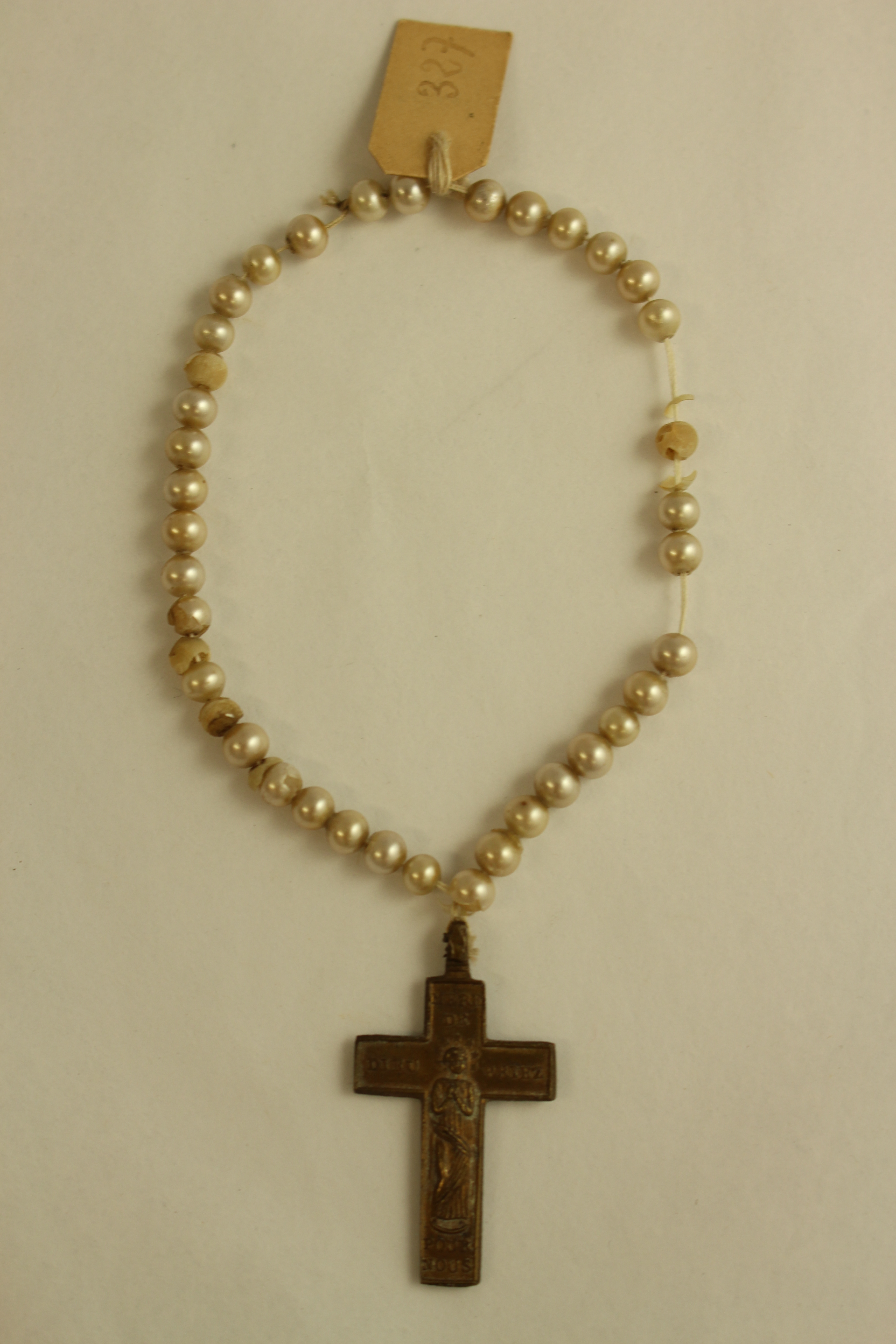 Collier enfant abandonné appartenant à Michel Collié; Musée des Hospices civils de Lyon; 2007.0.1087.M 343